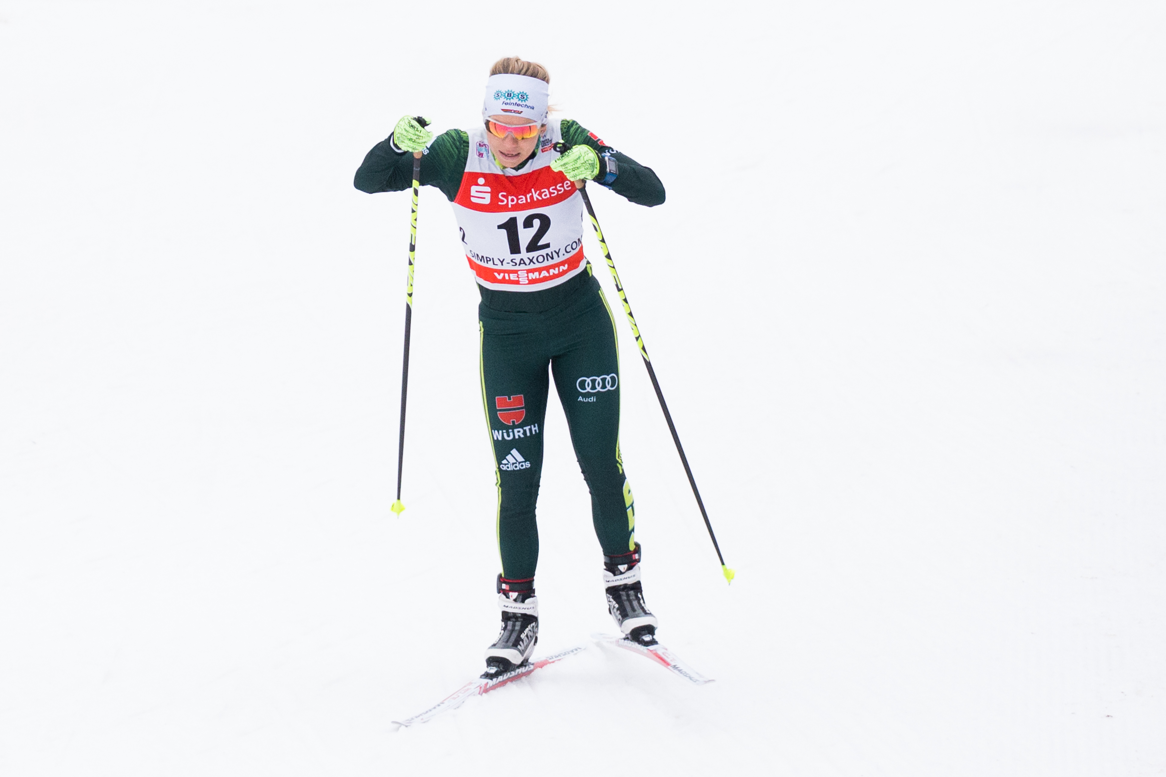 Sandra Ringwald (GER, Deutschland)